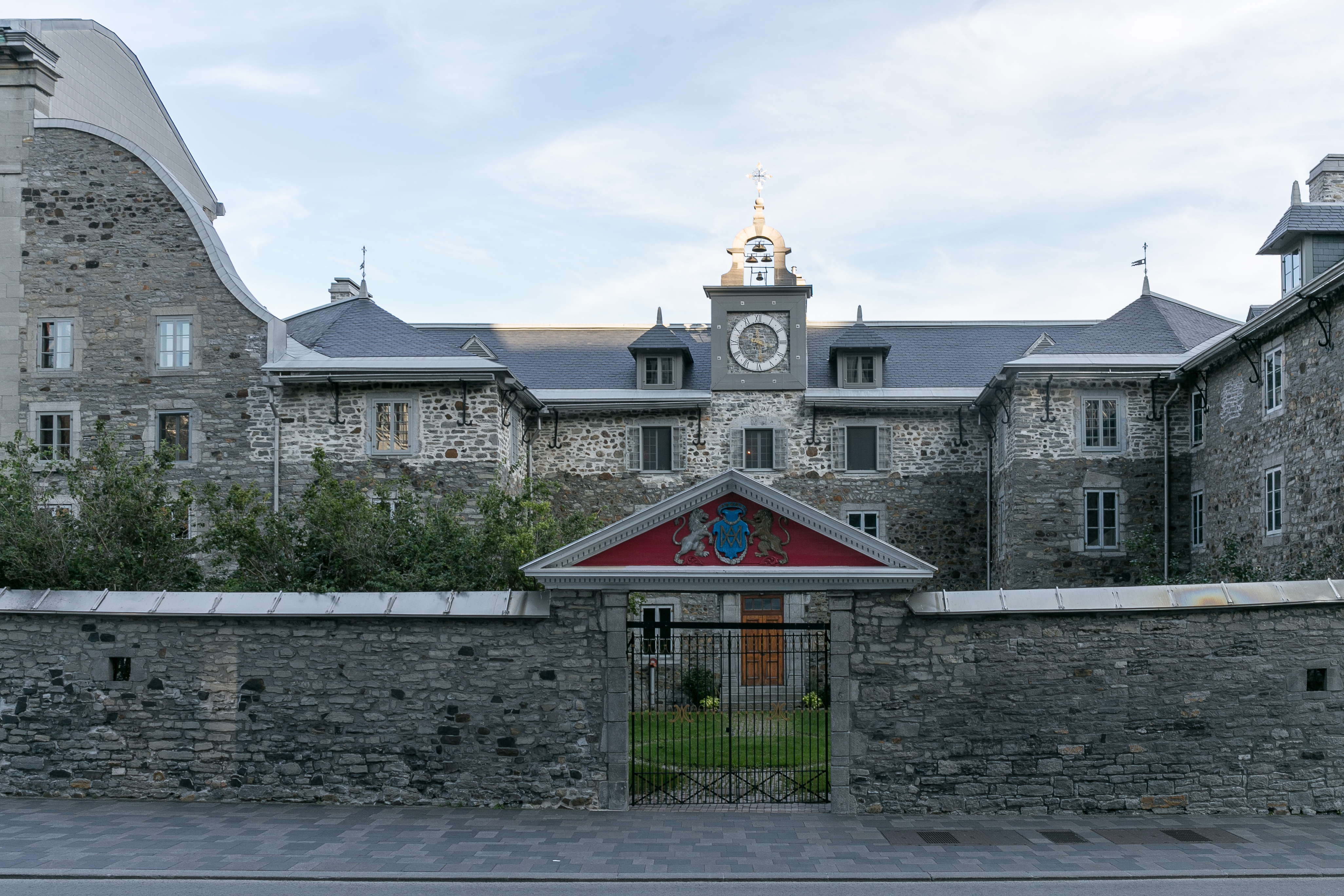 Vieux Séminaire de Saint-Sulpice, 16, rue Notre-Dame Ouest, Montréal (Canada). (Protection LHN. Voir la liste des lieux patrimoniaux de Montréal pour plus de détails).